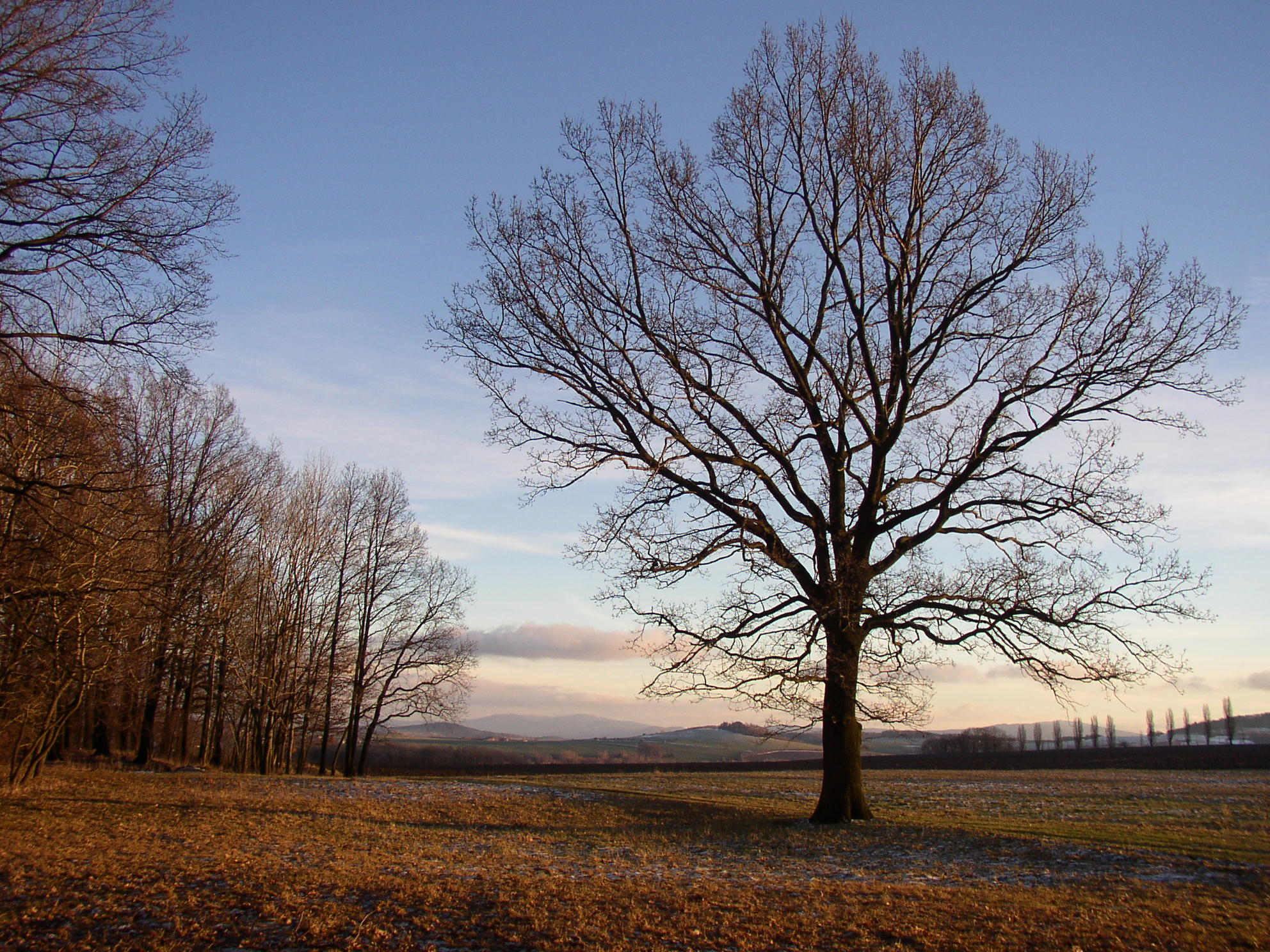 Blick von der Heinrichshöhe über Leutersdorf